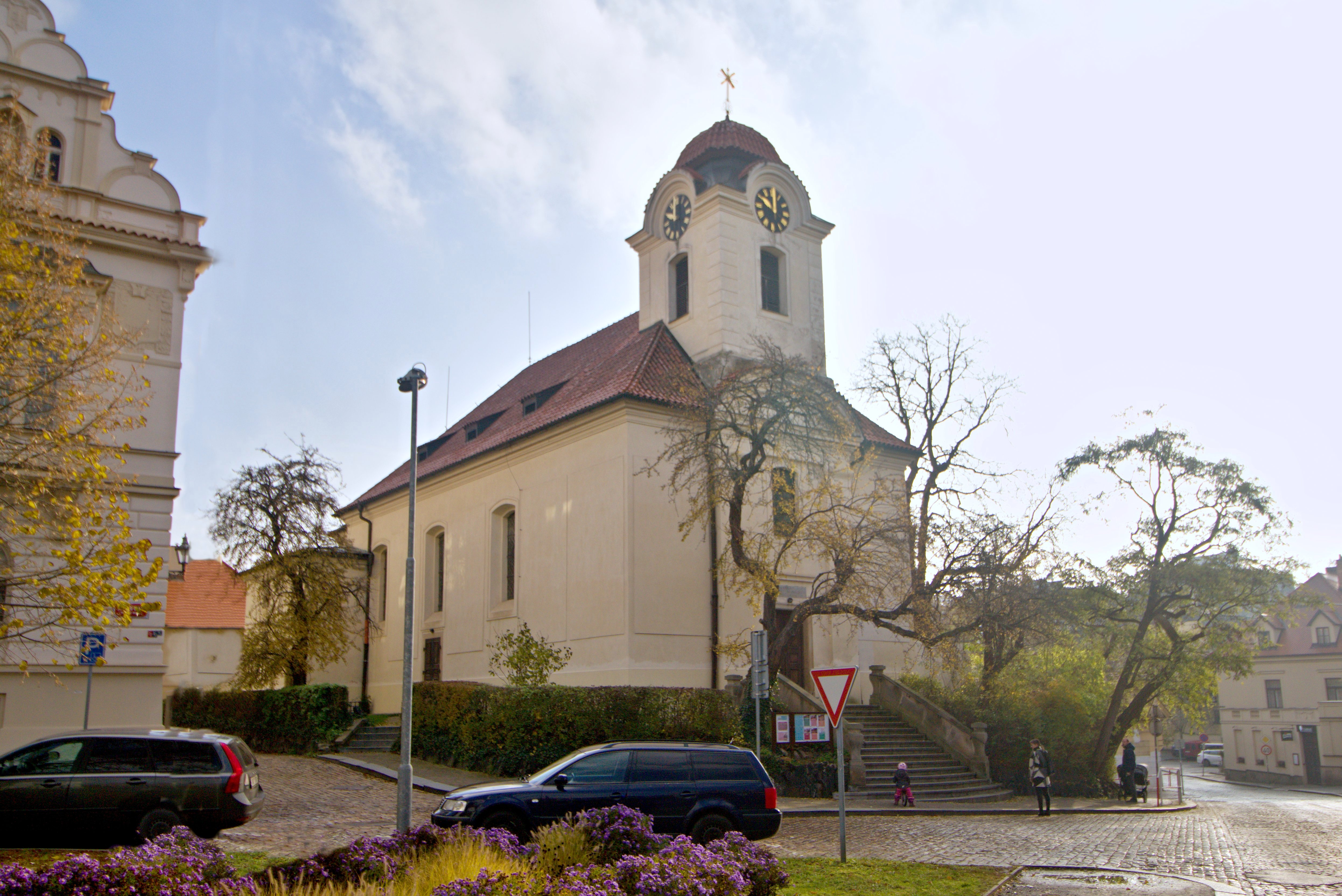 Praha 6-Bubeneč kostel sv. Gottharda